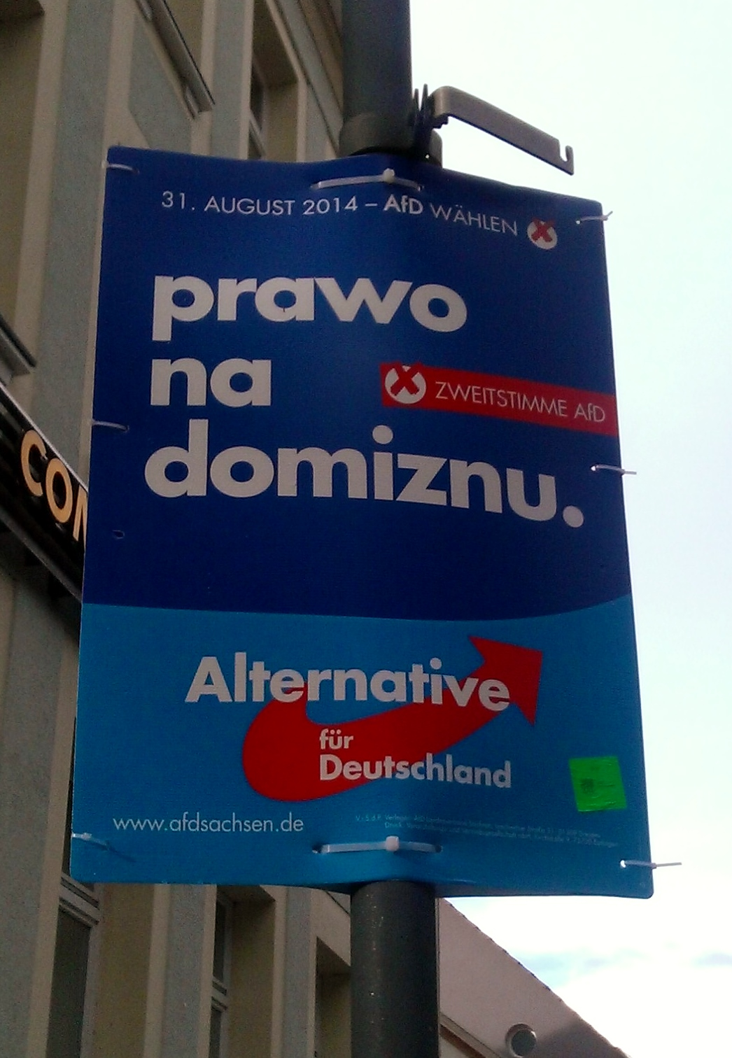 Wahlplakat der Alternative für Deutschland in Hoyerswerda zur Landtagswahl 2014 in Sachsen in obersorbischer Sprache (Prawo na domiznu ~ Recht auf Heimat) Hornjoserbsce: Dwurěčny wólbny plakat Alternatiwy za Němsku (AfD) za wólby do sakskeho krajneho sejma 2014.